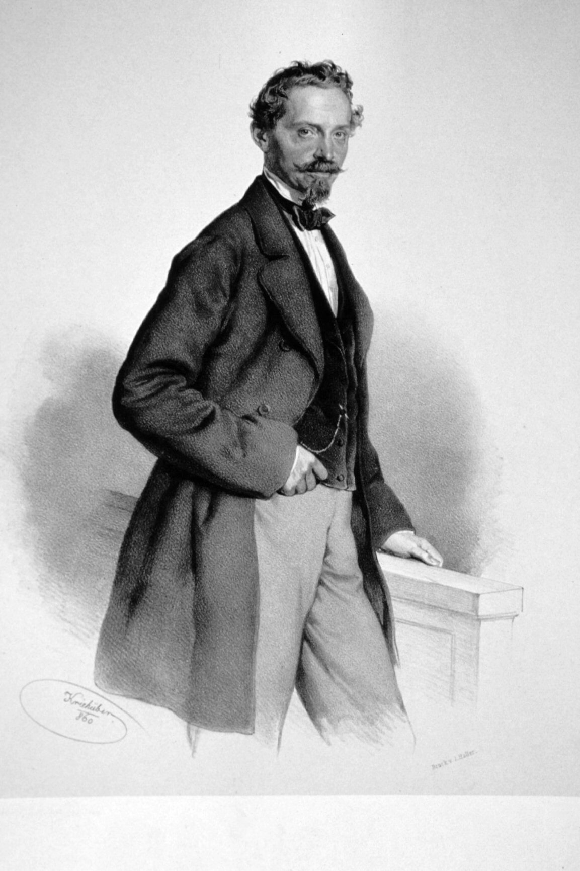 Franz Schebek (1814-1862), Architekt, Stadtbaumeister in Wien, tschechischer Politiker. Lithographie von Josef Kriehuber , 1860